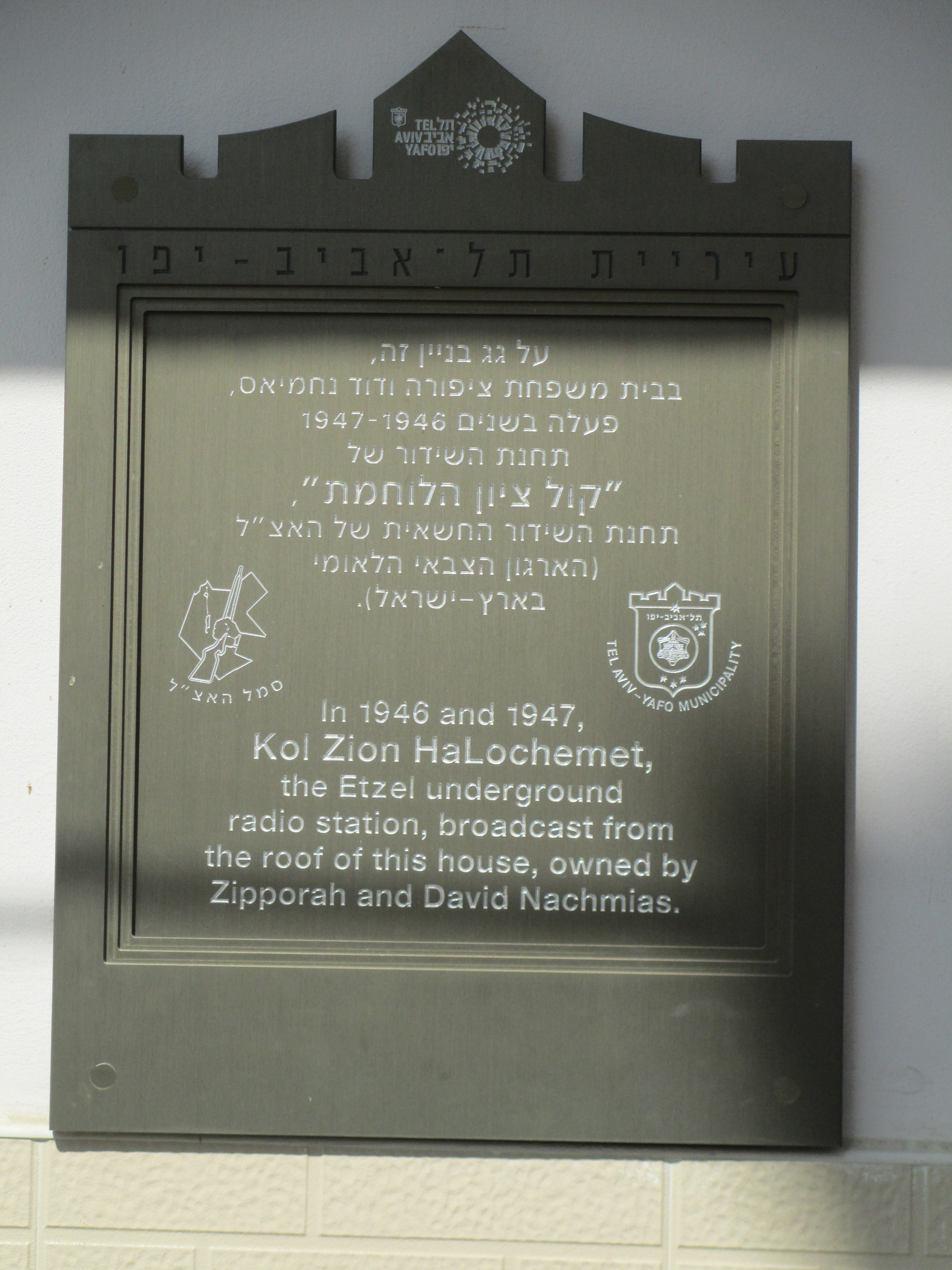 לוחית זיכרון לתחנת השידור של האצ"ל בשכונת התקווה, רח' חפר 24